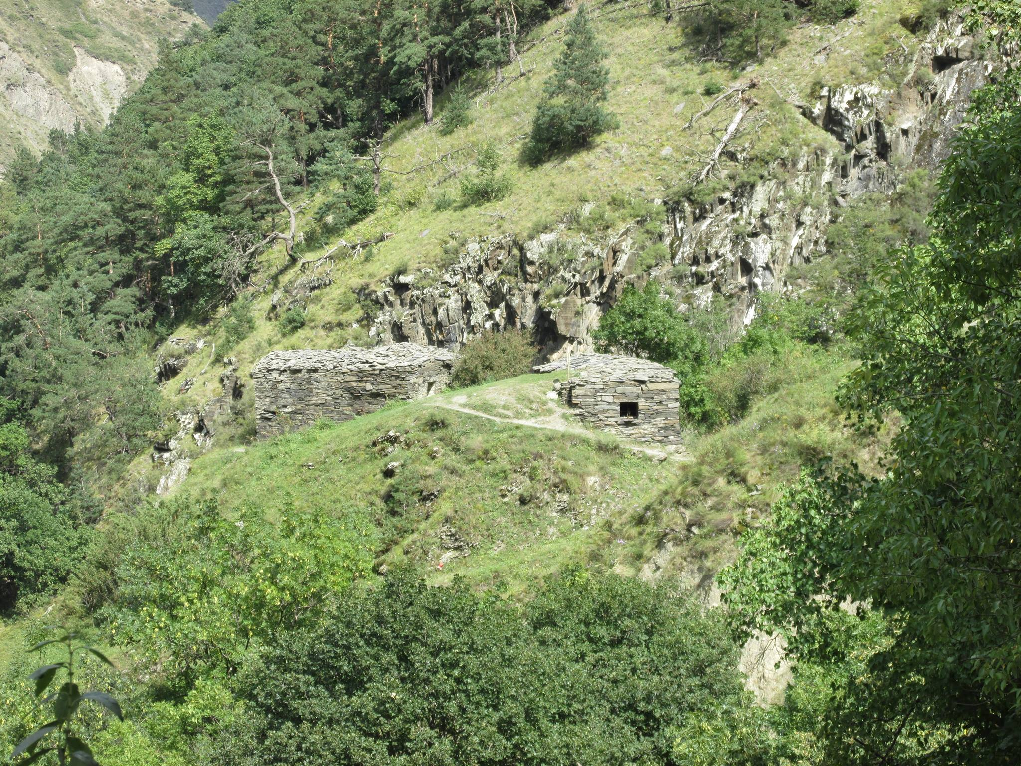 ანატორის აკლდამები